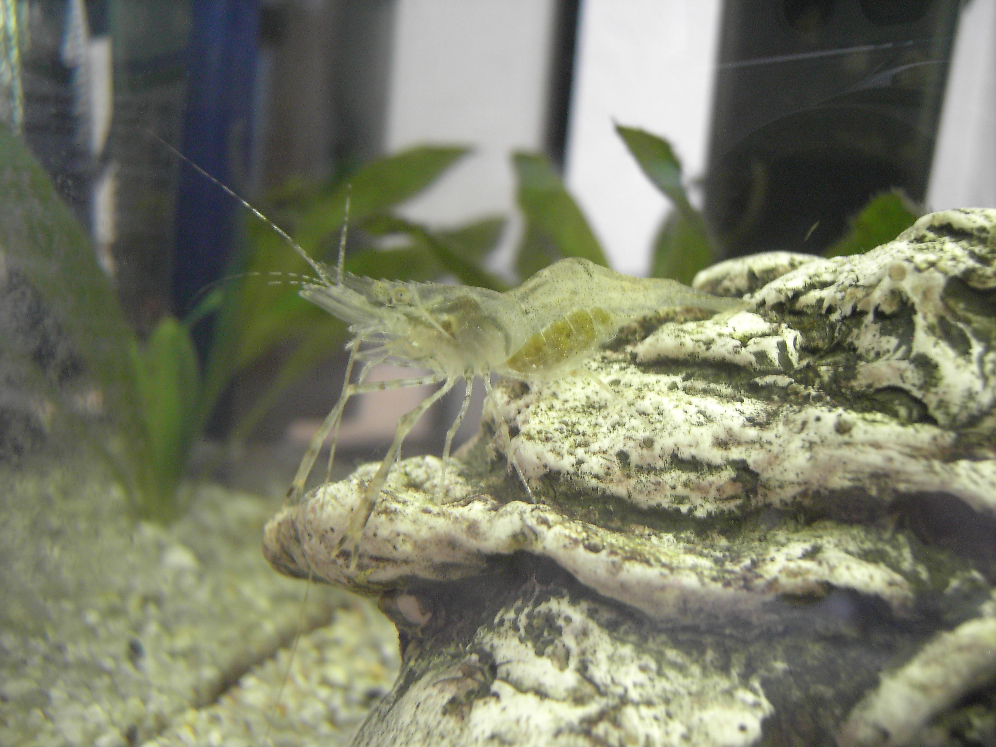 Macrobrachium assamense Tiwari (Ringelhandgarnele), ca. 3-4 Monate alt, mit Eiern.